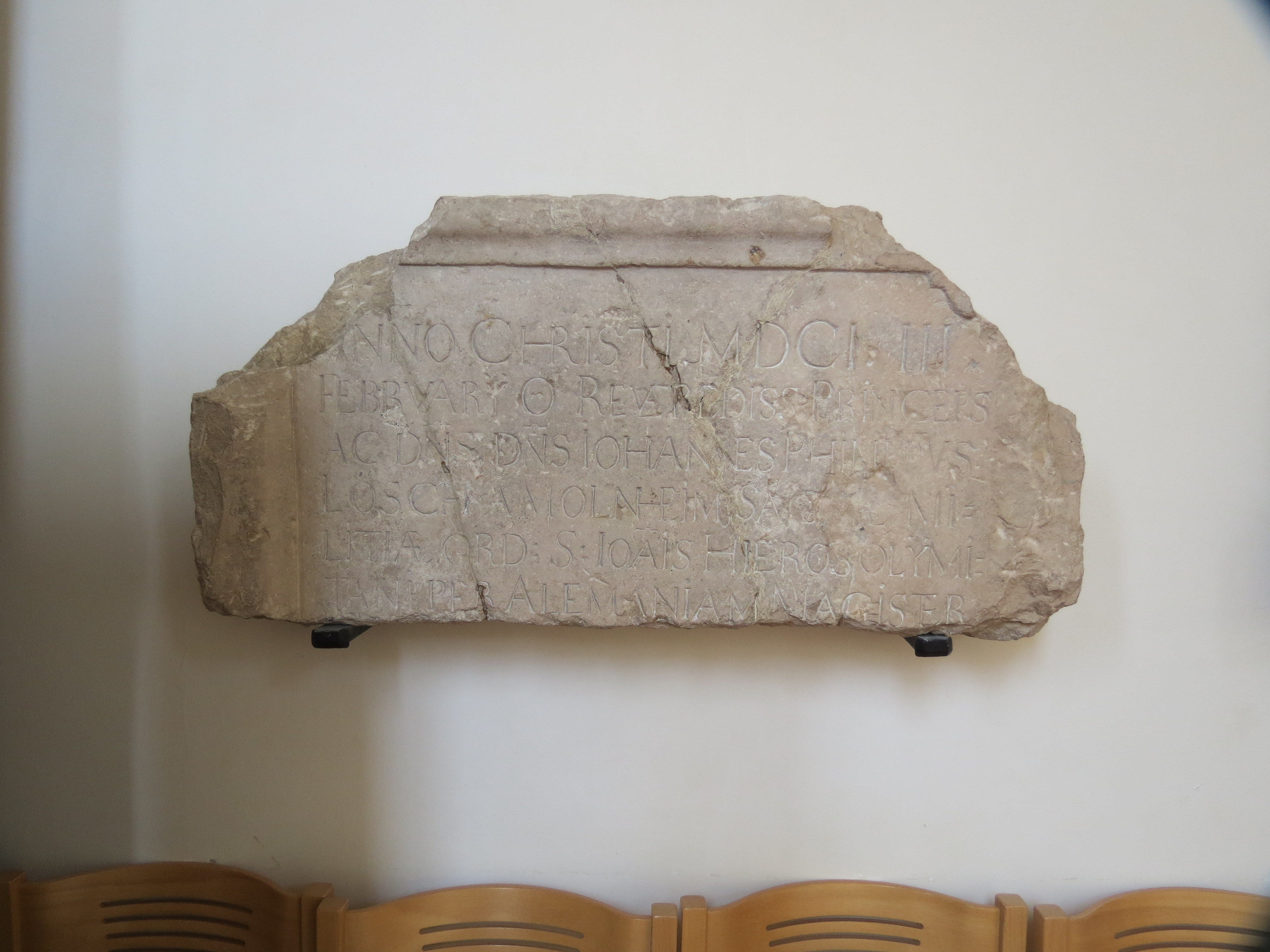 Epitaph des Großprior des Johanniterordens Johann Philipp Lesch von Mühlheim in der Johanneskirche in Villingen, Villingen-Schwenningen, Baden-Württemberg